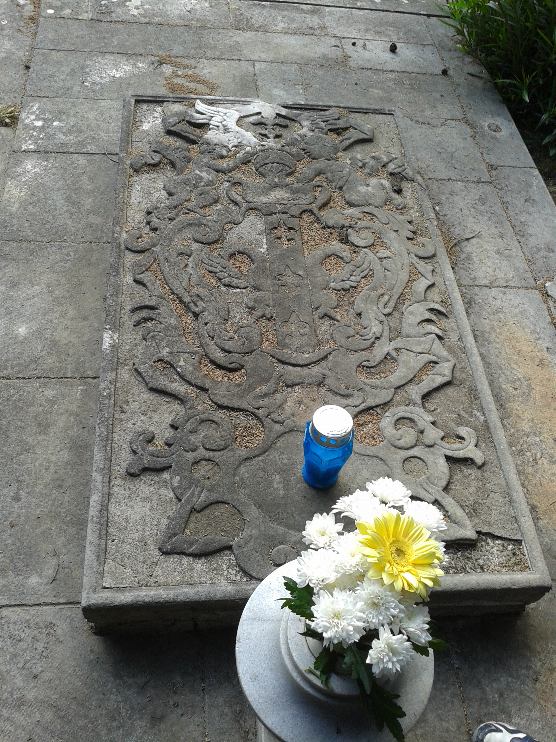 Grobnica s grbom obitelji Cappogrosso na splitskom groblju Lovrinac